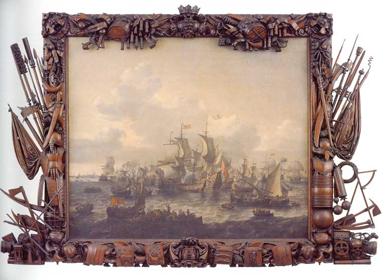 De slag op de Zuiderzee voor de rede van Hoorn tegen Bossu. Met een lijst van Johannes Kinnema.